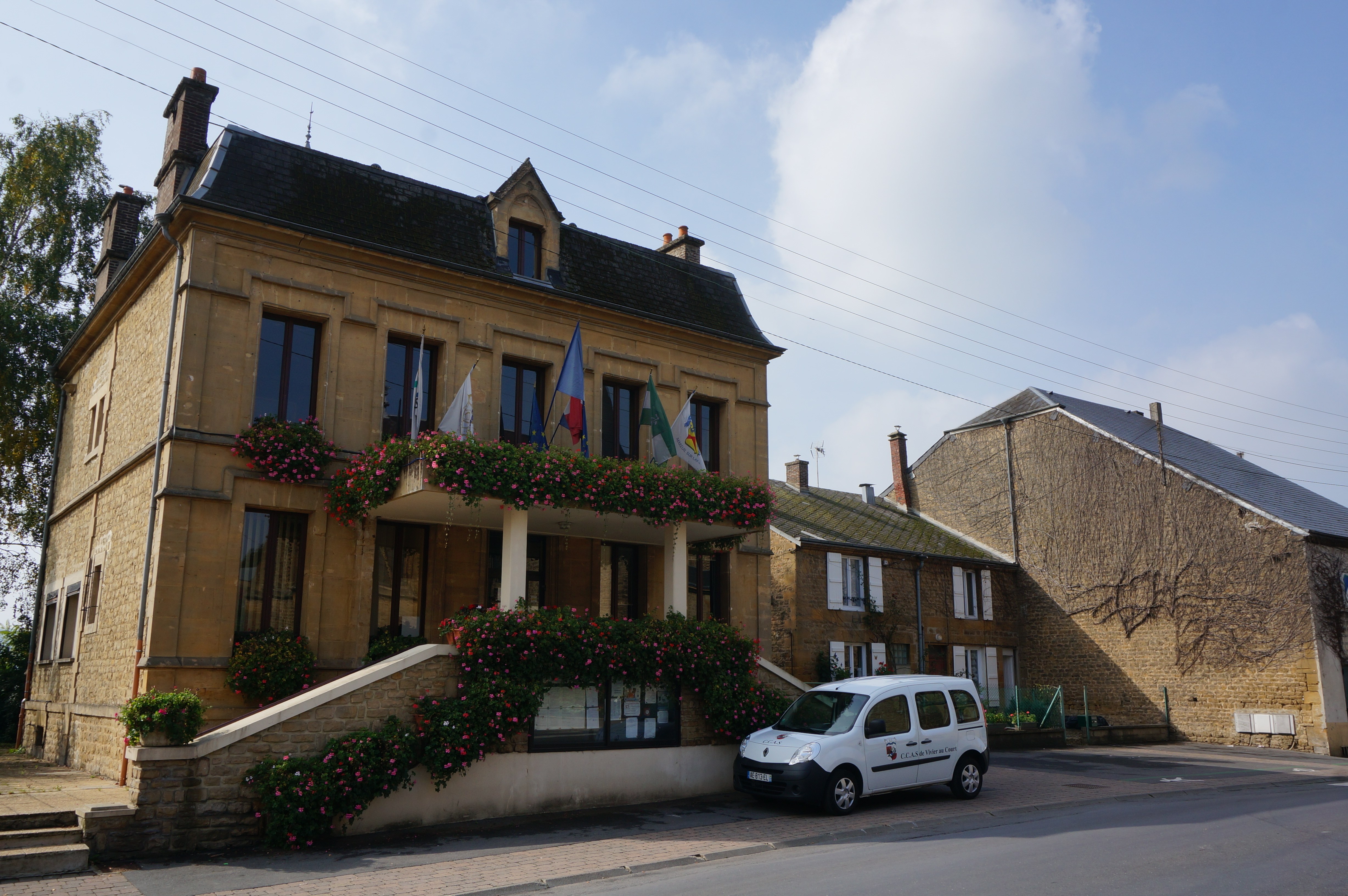 à Vivier-au-Court .